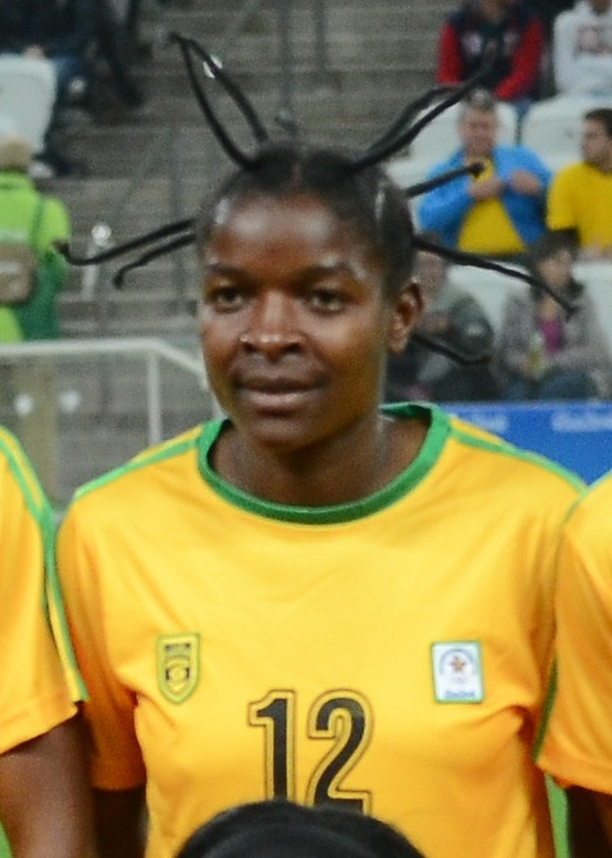 São Paulo - Seleções femininas do Zimbábue e da Alemanha se enfrentam na Arena Corinthians (Rovena Rosa/Agência Brasil)